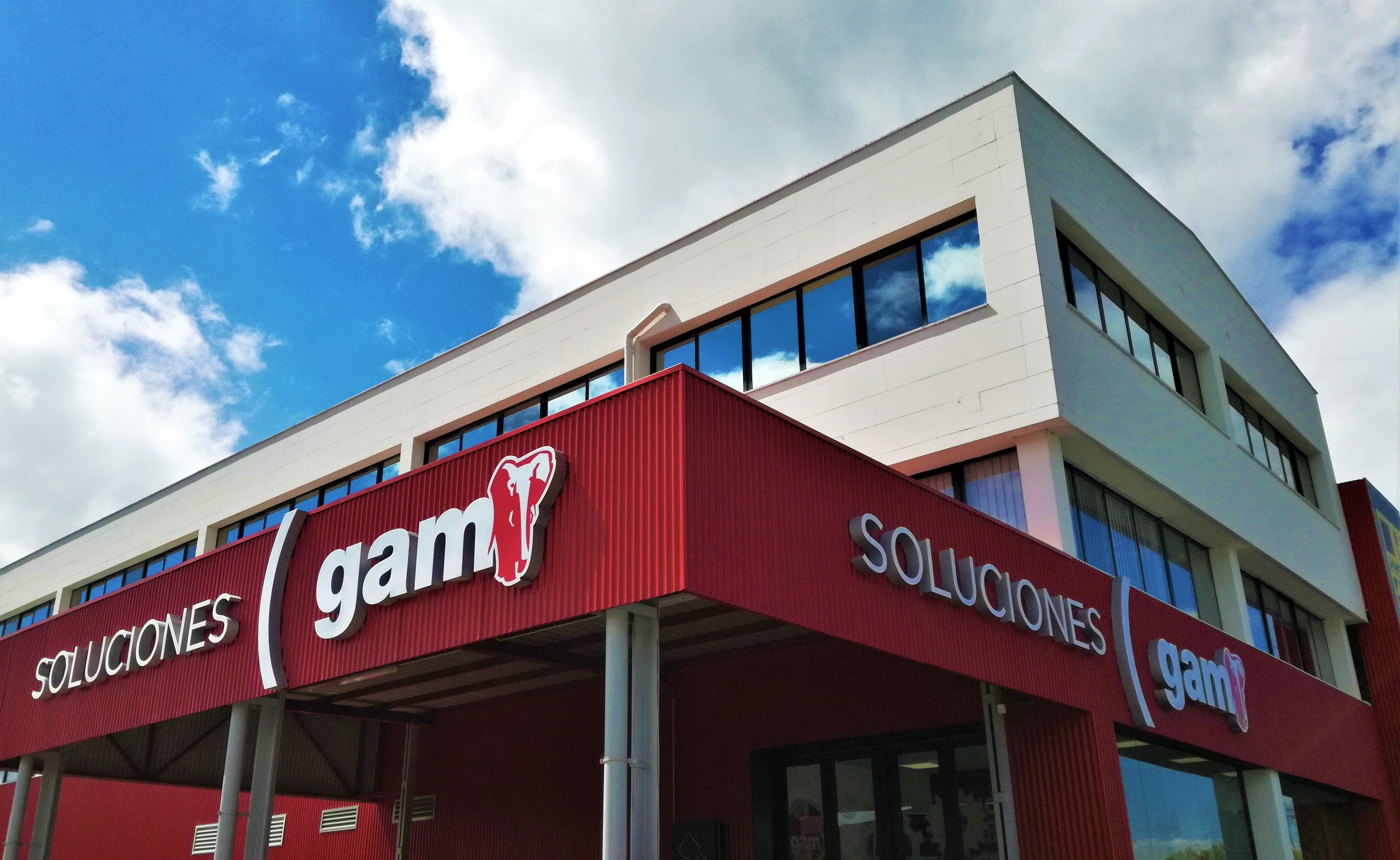 Oficinas centrales del grupo GAM en Siero, Asturias.